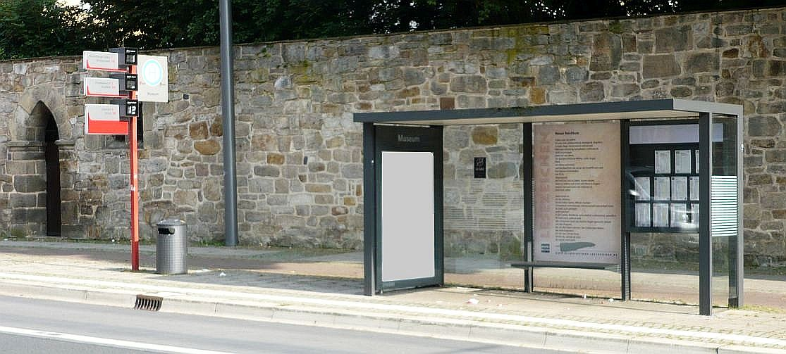 SVHI-Haltestelle Museum